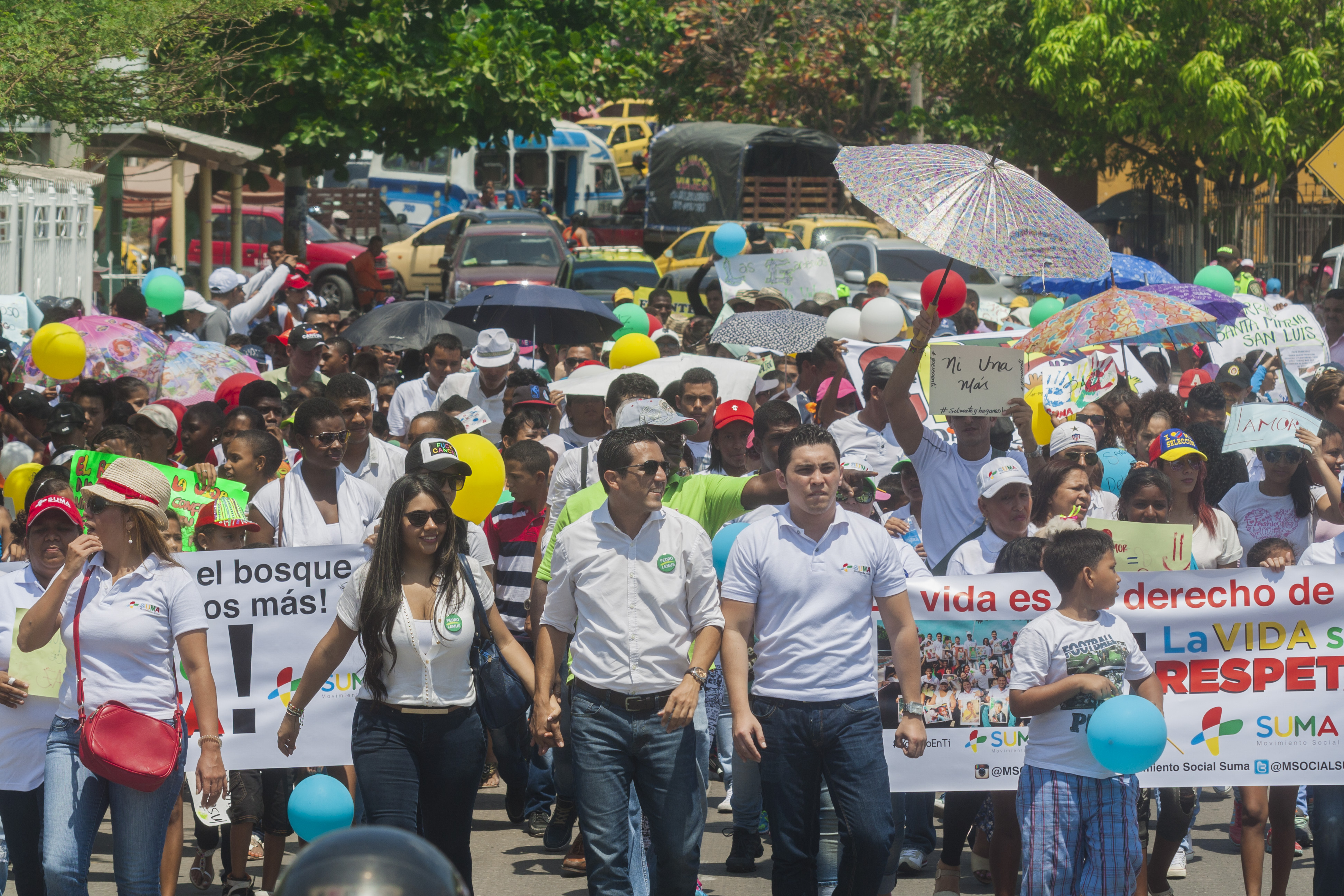 Pedro Lemus en la marcha por la paz Barranquilla 2015